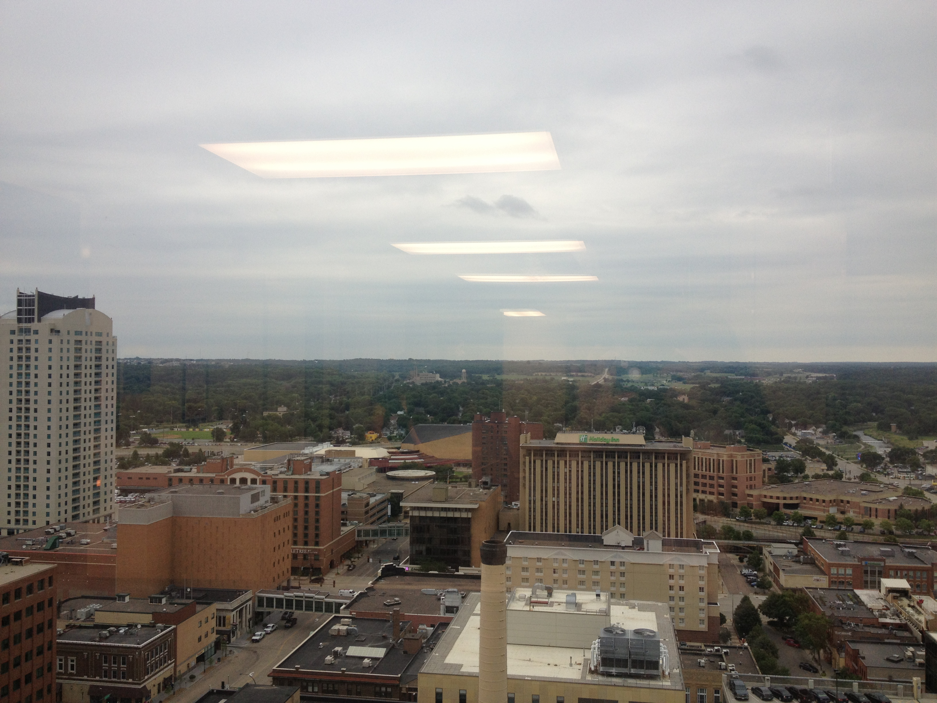 Rochester, MN